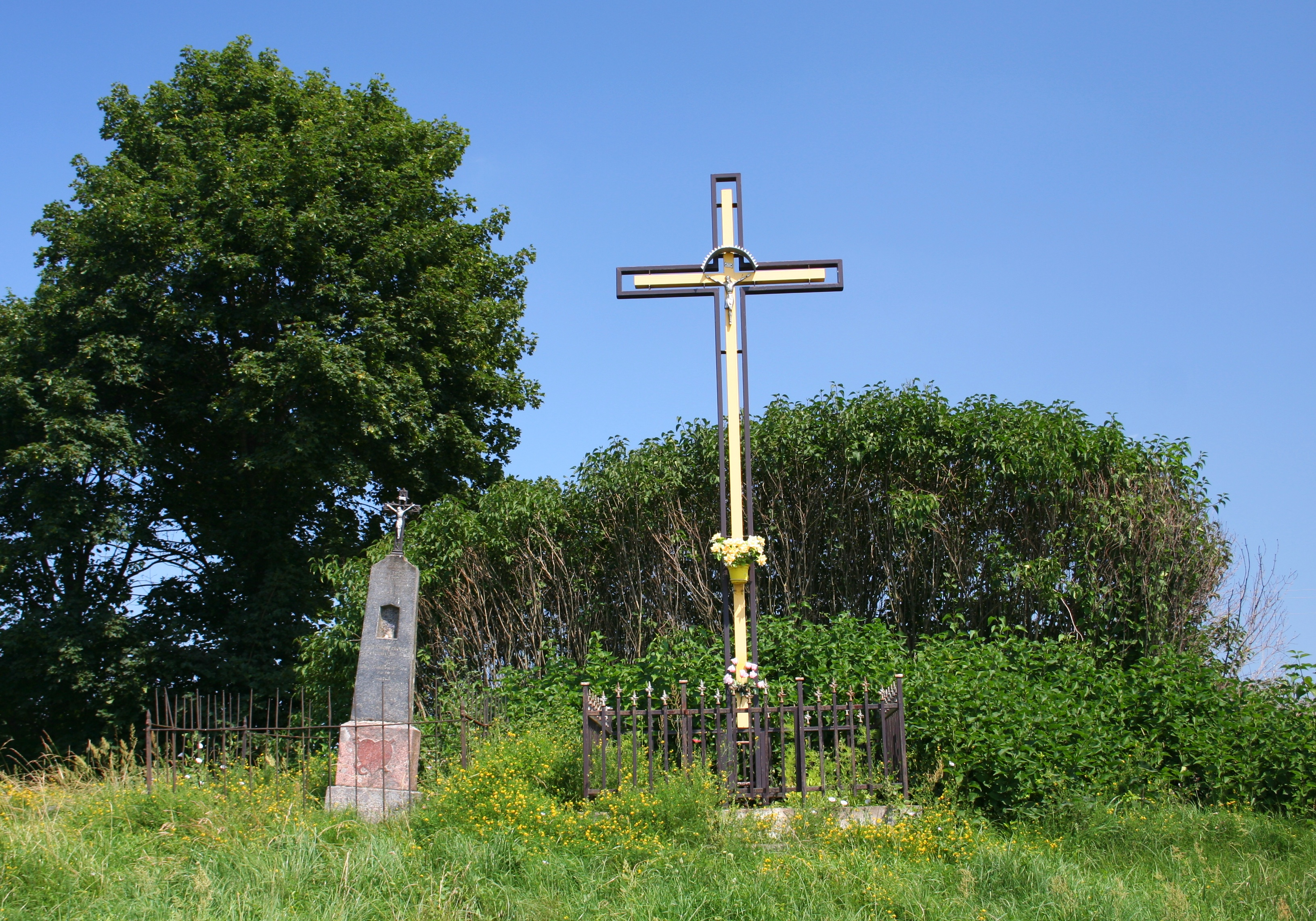 Krzyże przydrożny we wsi Szuszalewo, woj. podlaskie